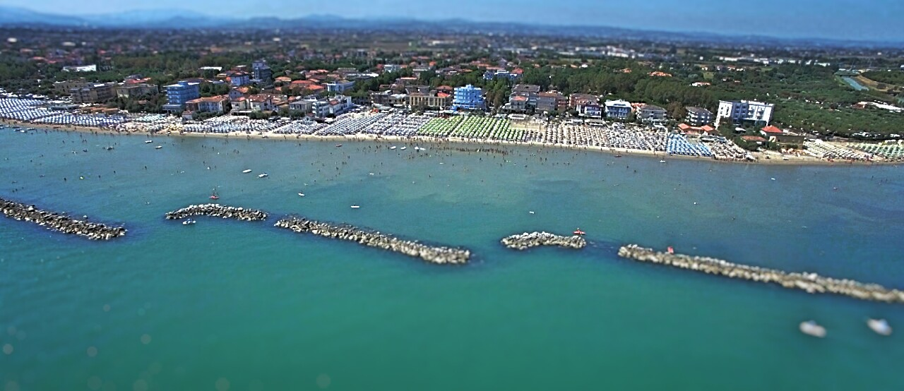 Vista aerea spiaggia San Mauro Mare migliorata